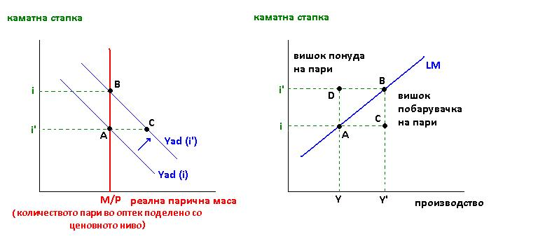 Егзогеното зголемување на БДП (Y) ја зголемува побарувачката на пари за било која каматна стапка, оттука и поместувањето од D во D' на графикот од левата страна. При почетната каматна стапка i, сега постои вишок побарувачка, што е претставено во точката C на двете страни (на двата графика).